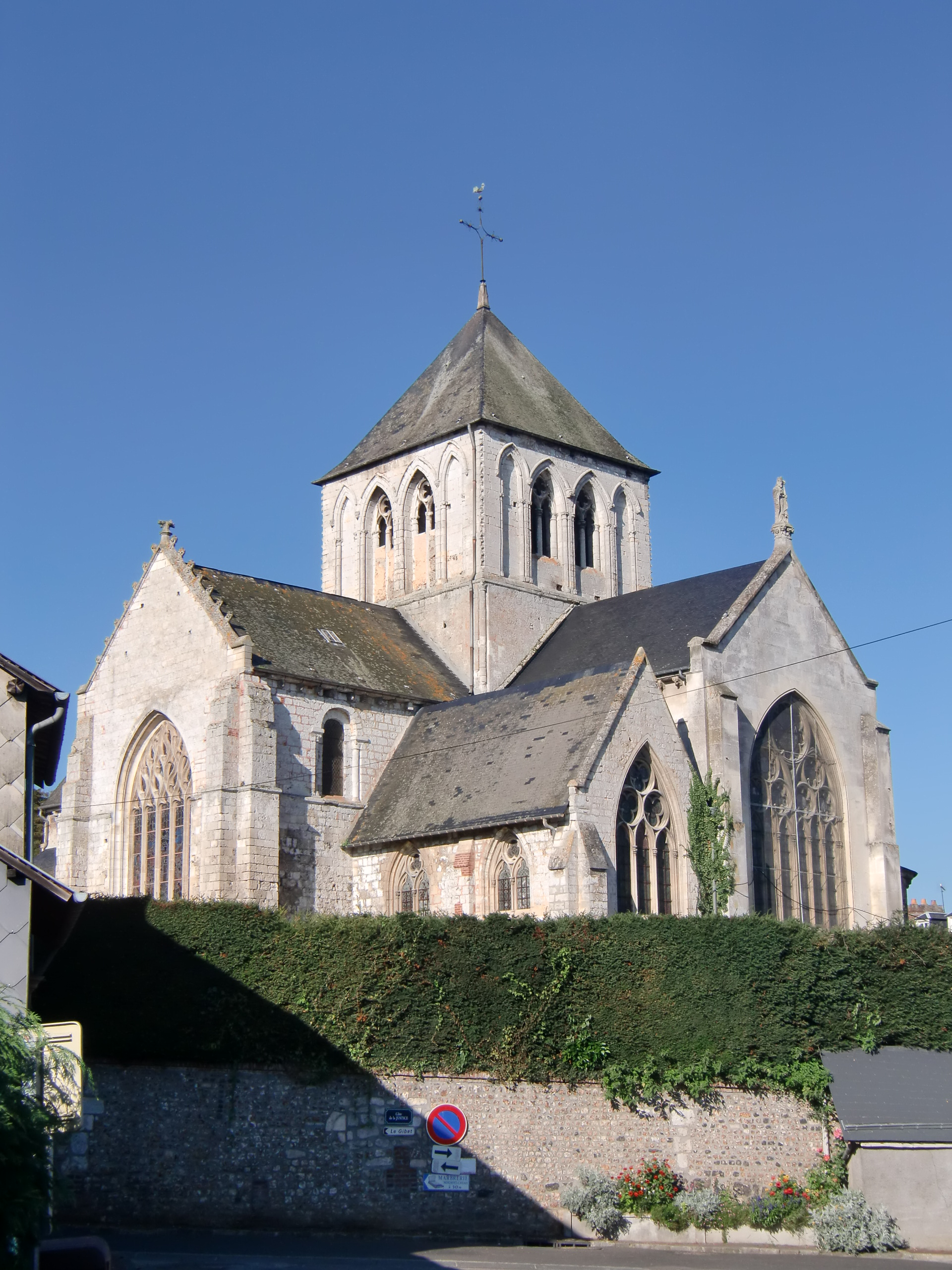 Eglise de Saint-Germain-Village (Eure, Normandie, France)